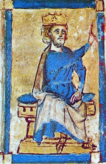 Król Danii Eryk Glipping Miniatura z 1282 r. Oryginał znajduje się w Tallinie.